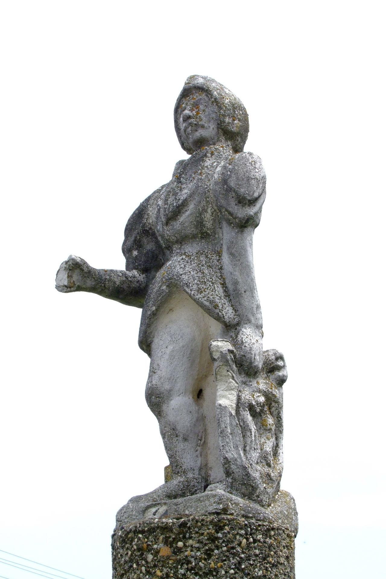 Figurenbildstock Roland